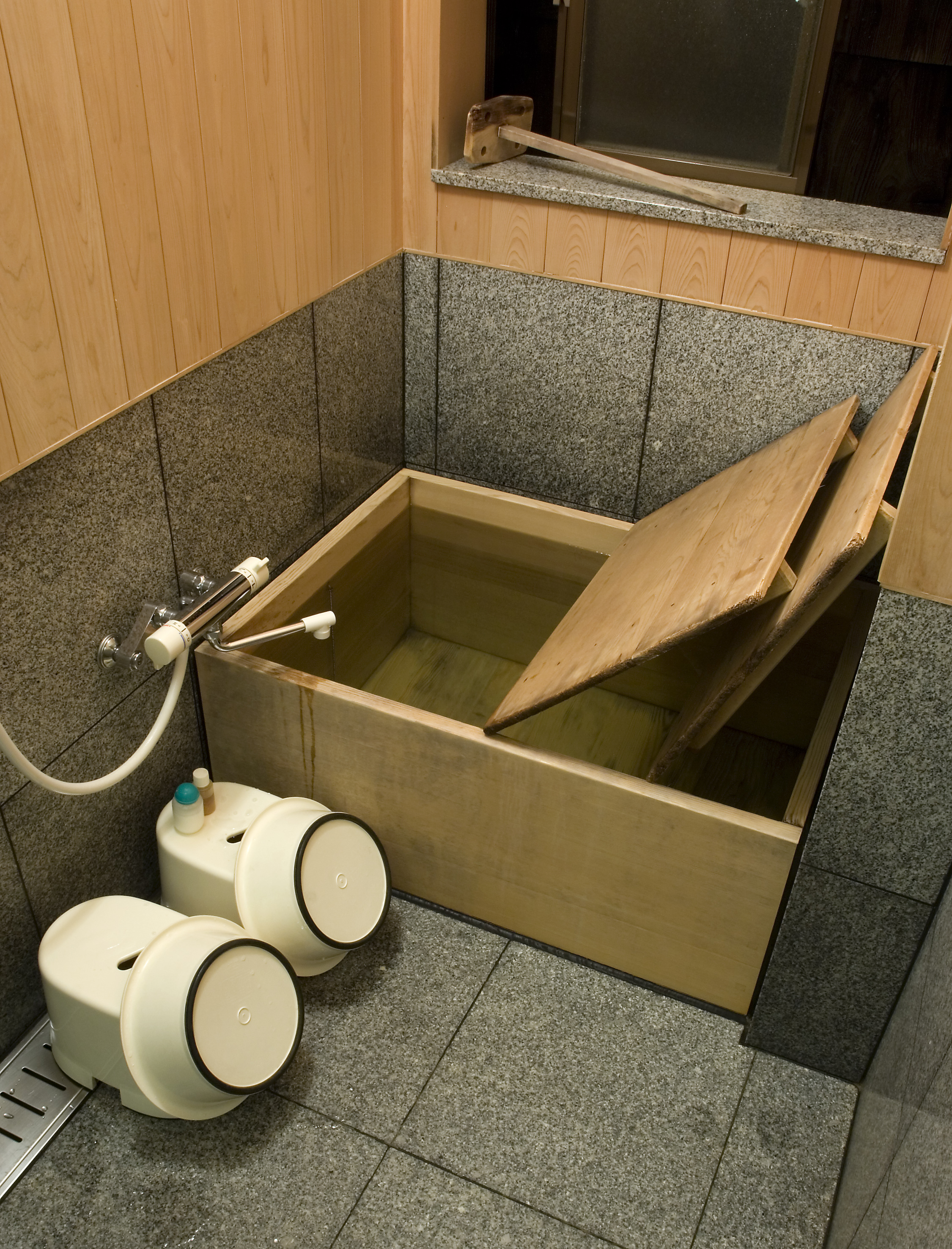 Ofuro at Tamahan ryokan, Kyoto